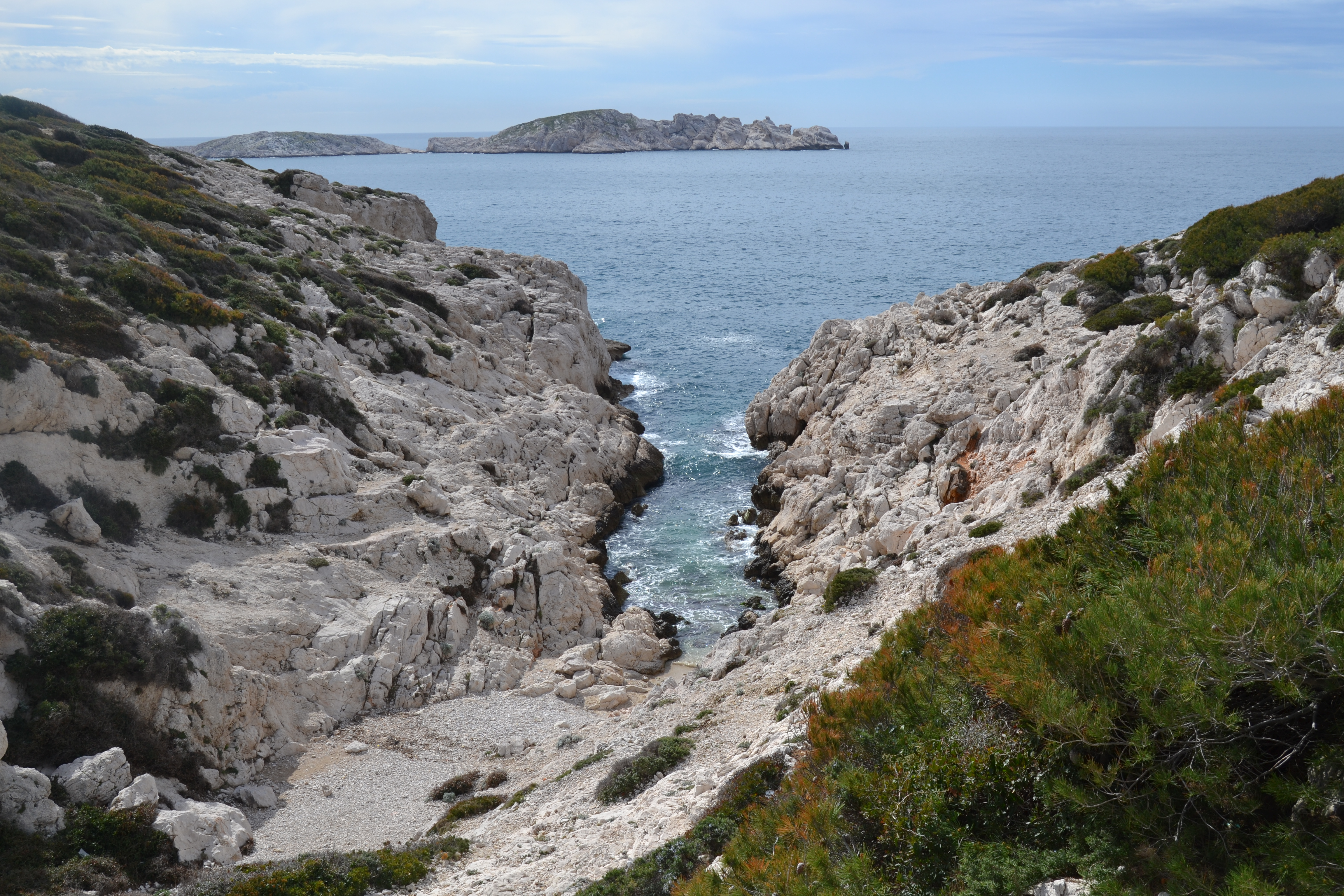 Calanque de la Mounine, dans les Calanques de Marseille